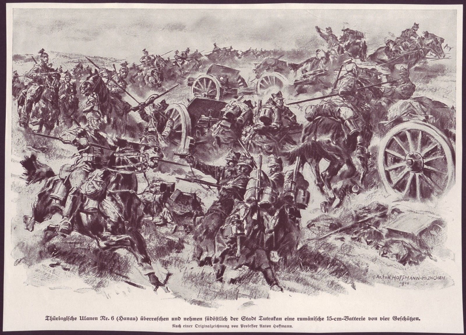 Ulanen Regiement Nr 6